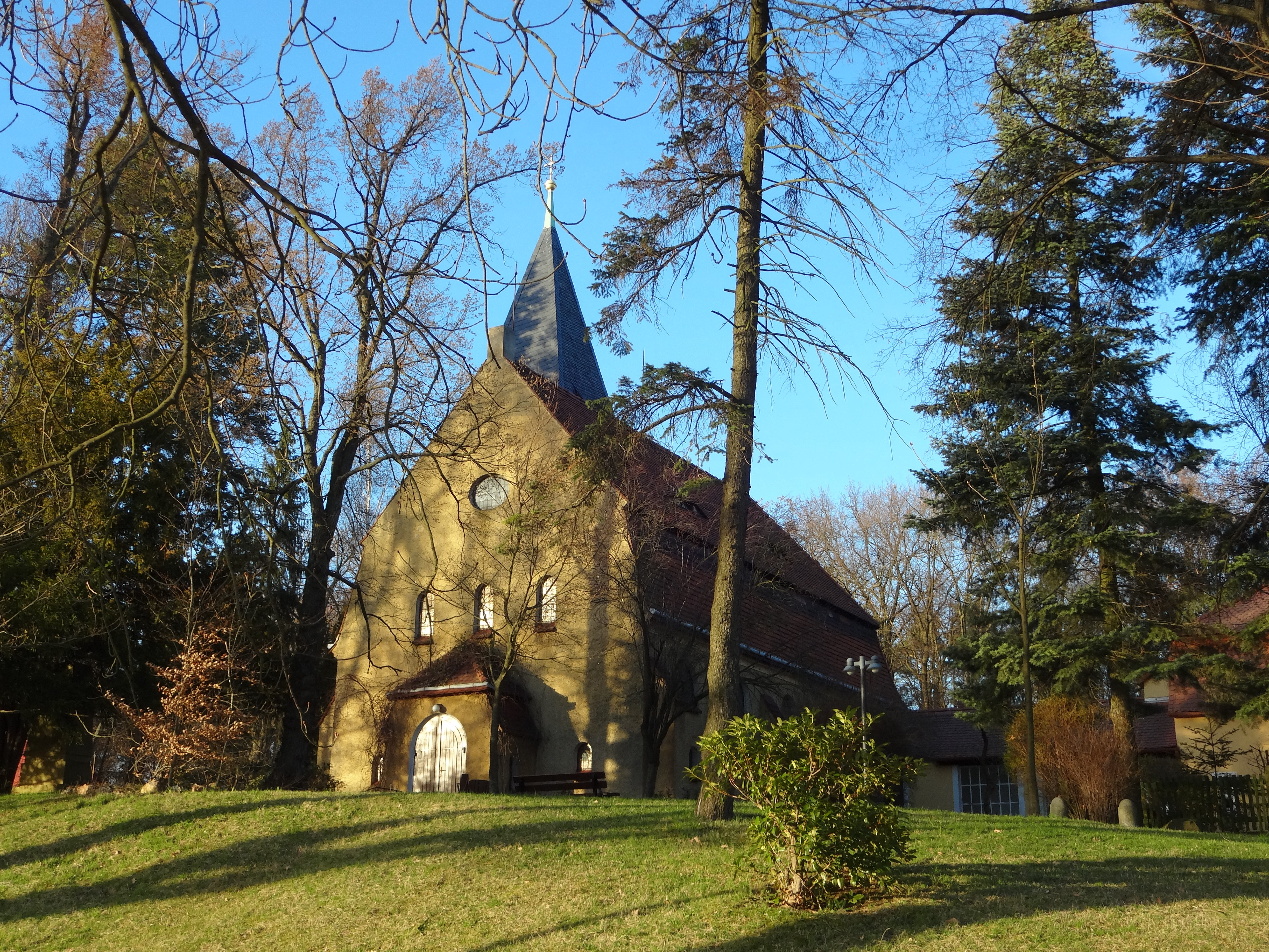 Kulturdenkmal Kirche in Cunnersdorf, Gemeinde Schönteichen